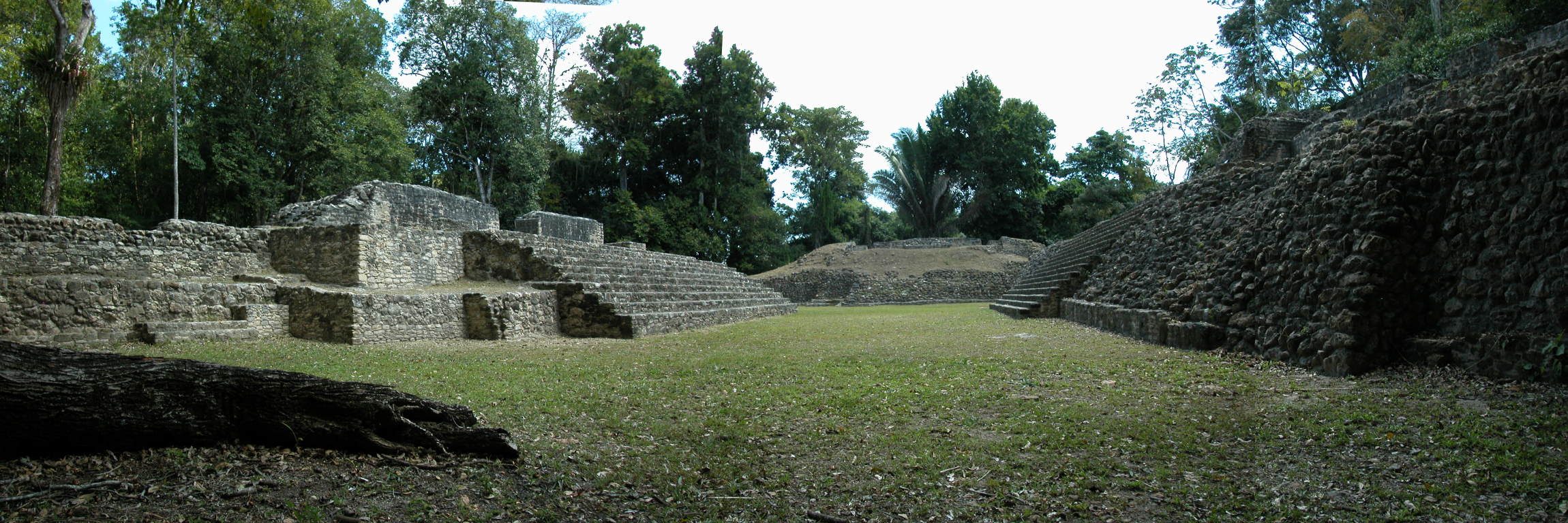 Photo d'un complexe residentiel Maya, situé à l'est de Caana. Dans les ruines de Caracol, au Belize